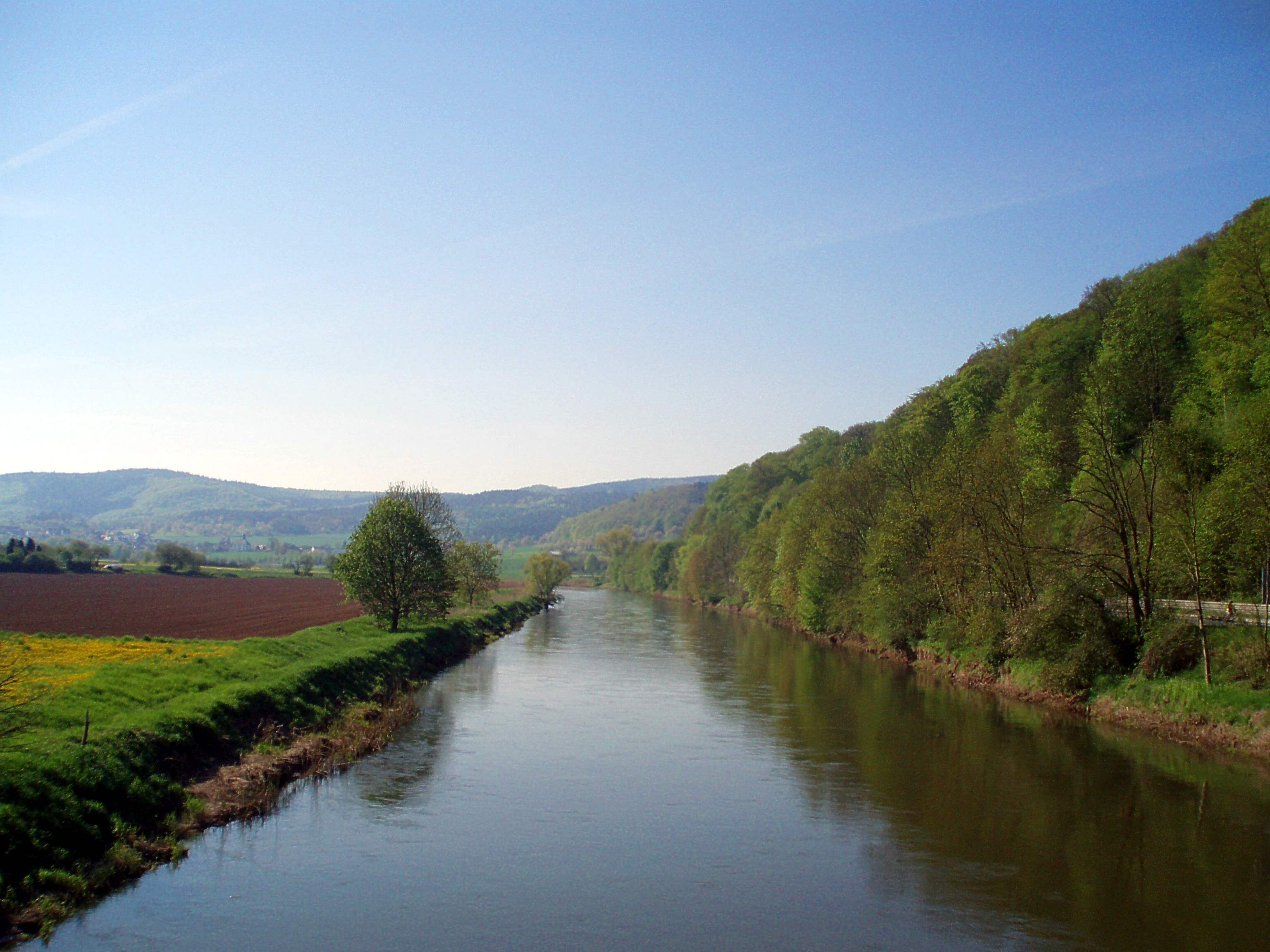 Blick von der Werrabrücke bei Werleshausen nach Süden